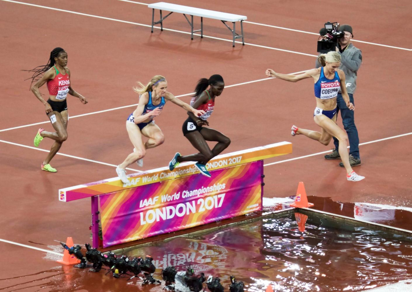 d7_28 3000mst dames finale